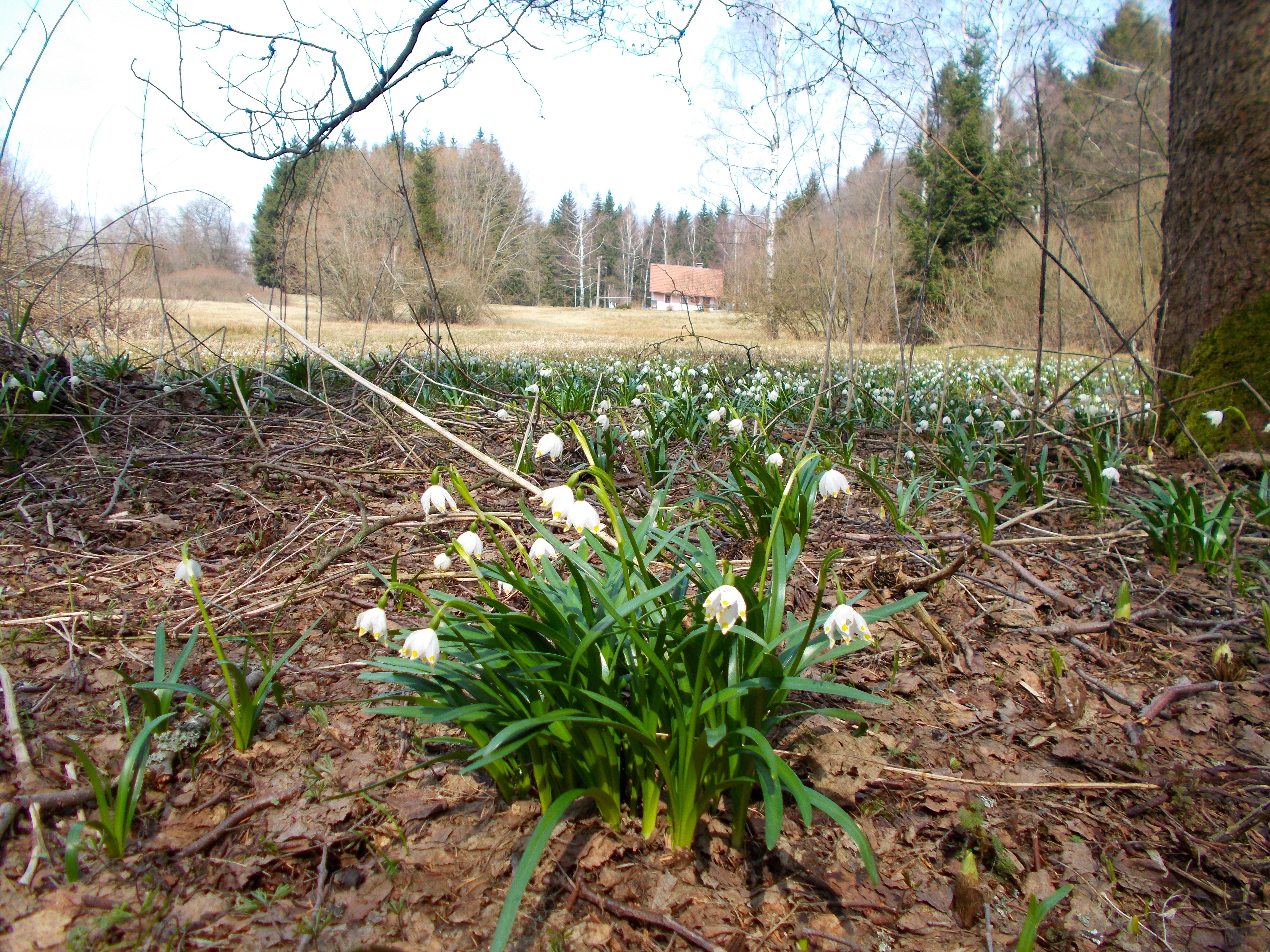 PP Rašelina